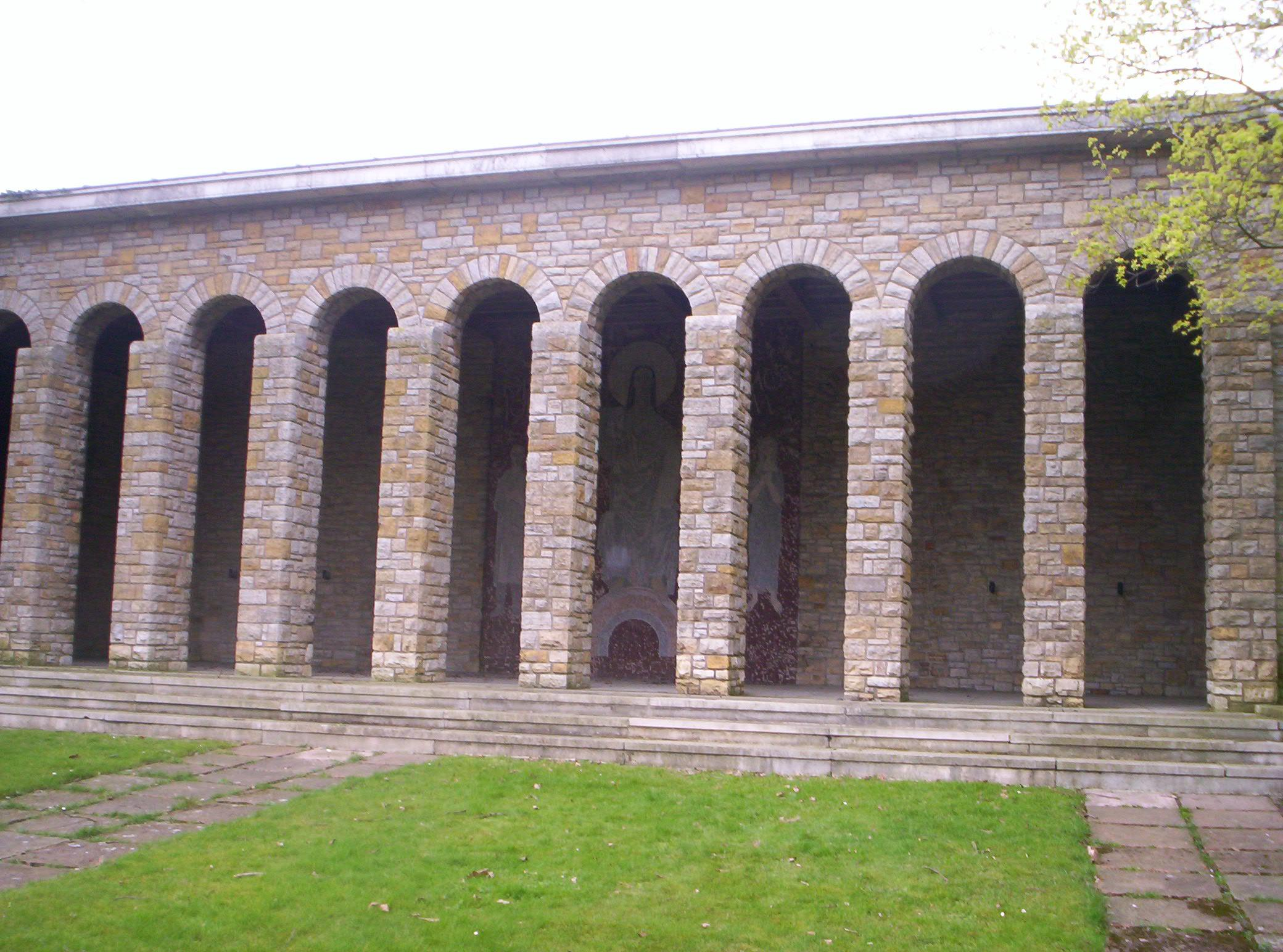 Ehrehalle Hooglede